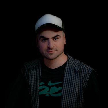 Pictur off Daniel Devita